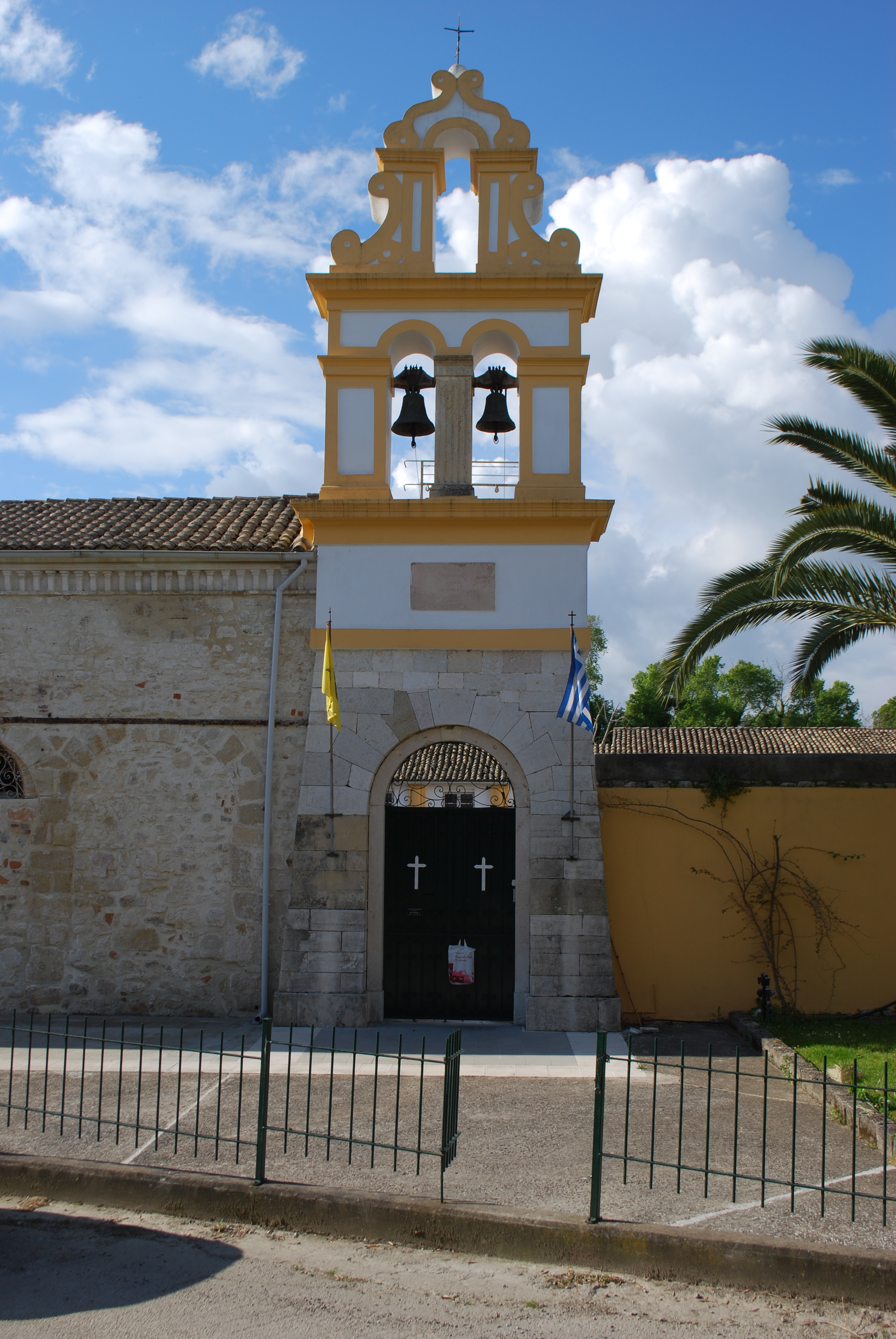 Vue de Corfou.